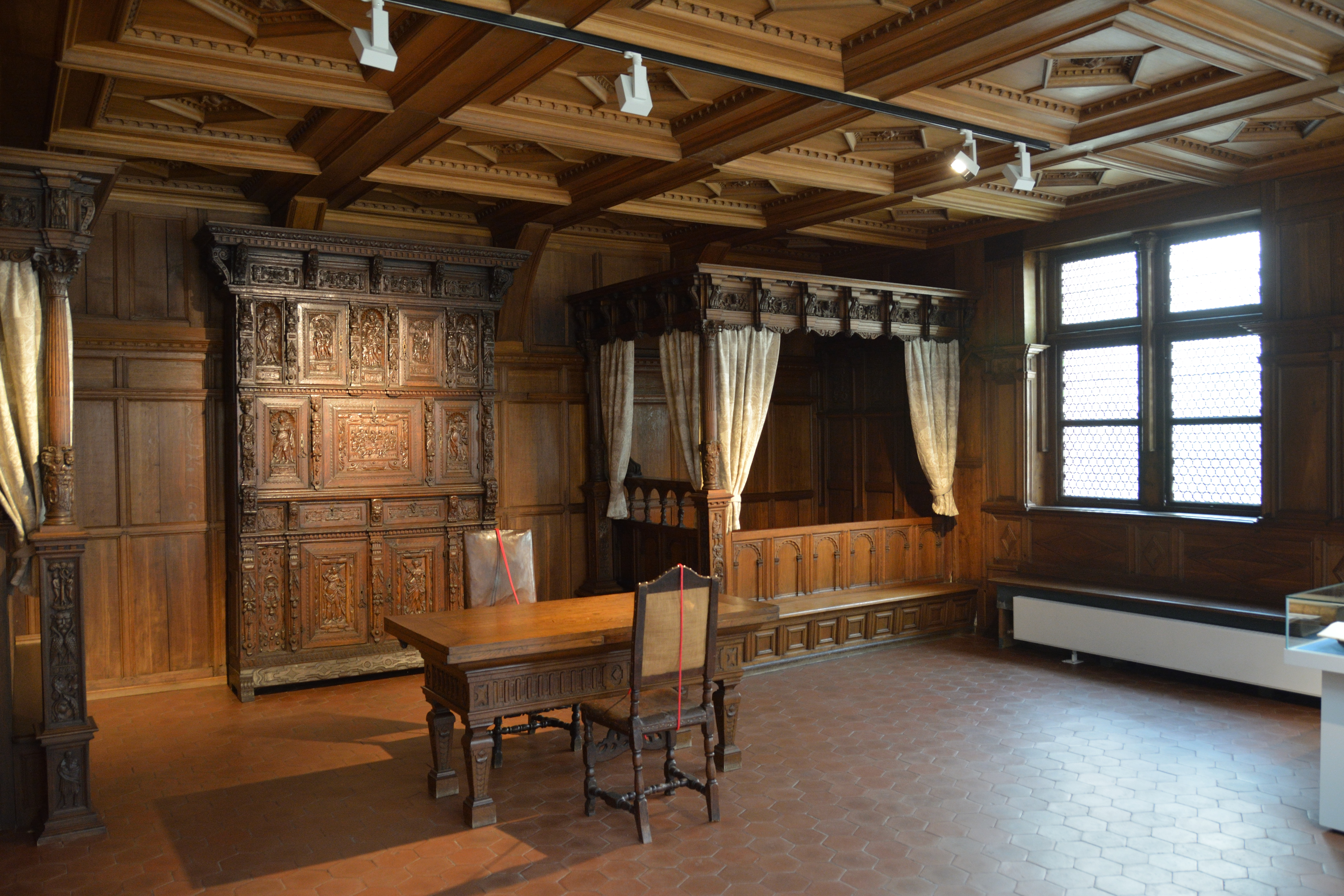 Impressionen aus dem Dithmarscher Landesmuseum Der rekonstruierte Gerichtssaal des Landvogtes Markus Swin